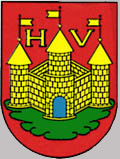 Blason de Huy (Belgique)